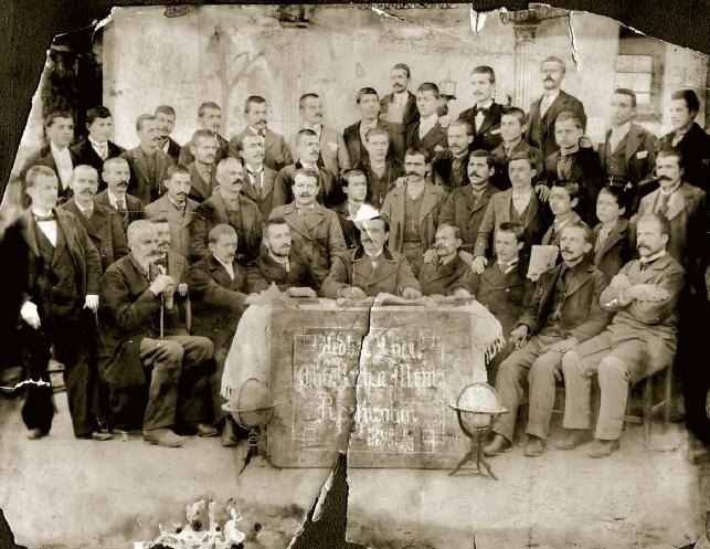 Активисти на Неделното училиште „Св. Кирил и Методиј“ од Крушево, 15.11.1898. Велко Николов седи, четврти од десно.